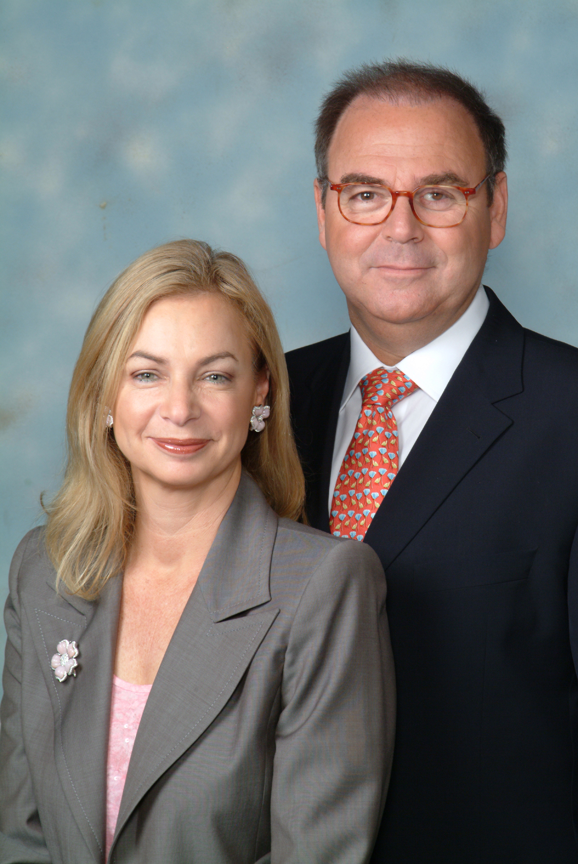 אריאלה ואיתן ורטהיימר הוגי "חזון אדם"